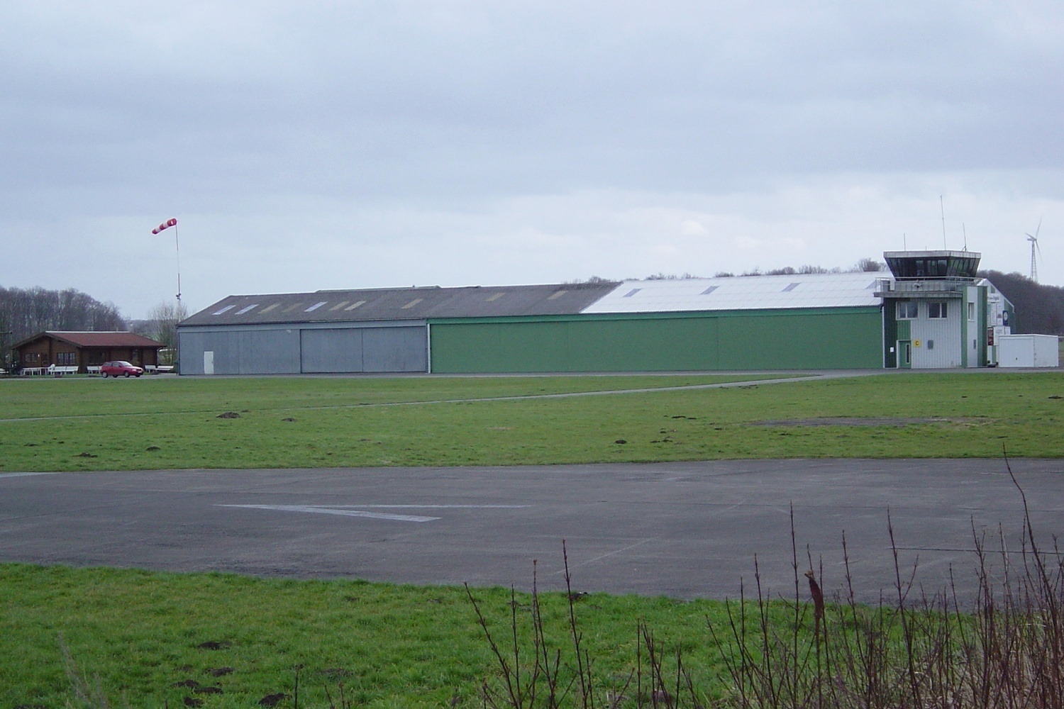 Flugplatz Melle-Grönegau (EDXG)